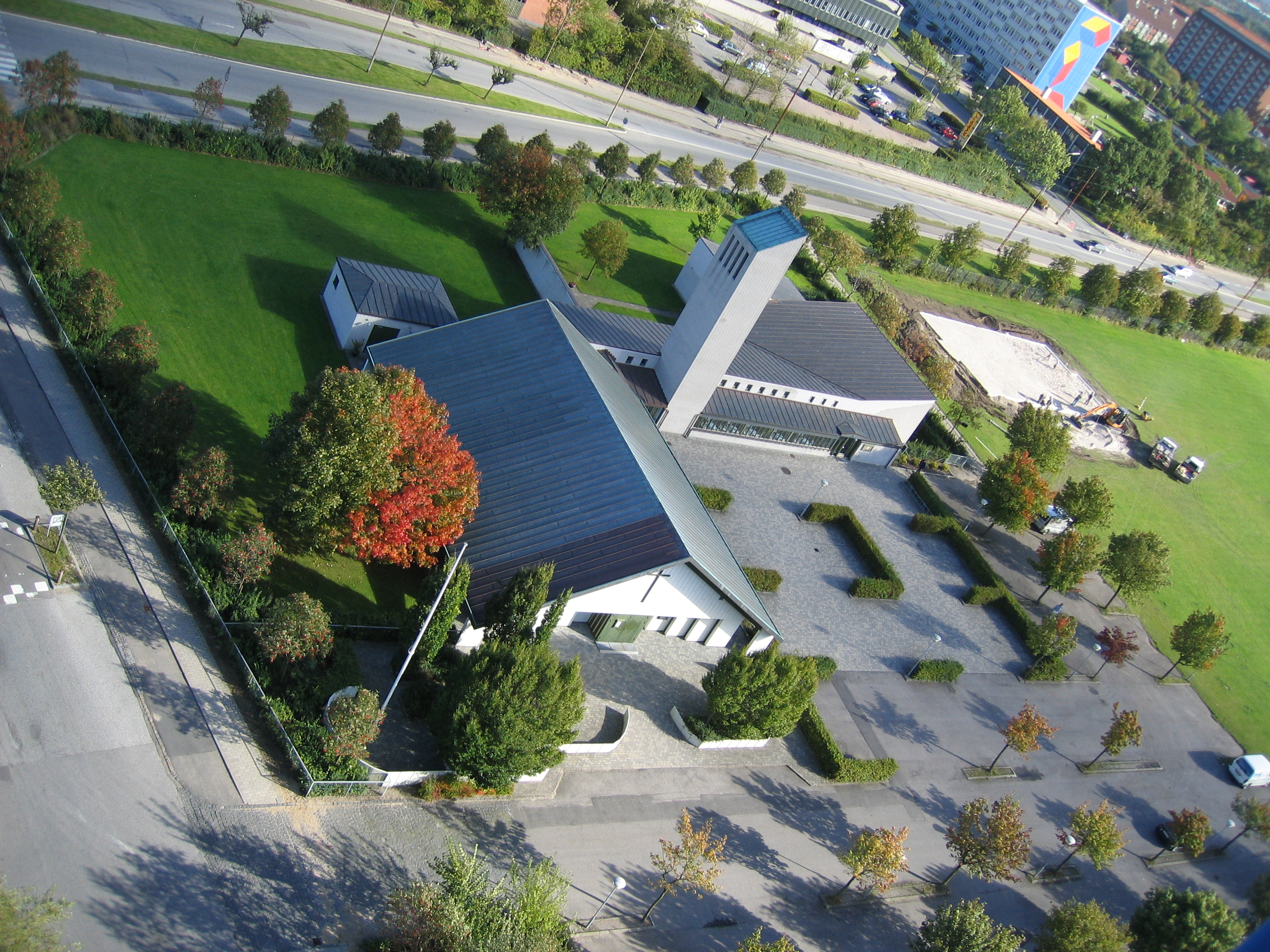 Nygårdskirken